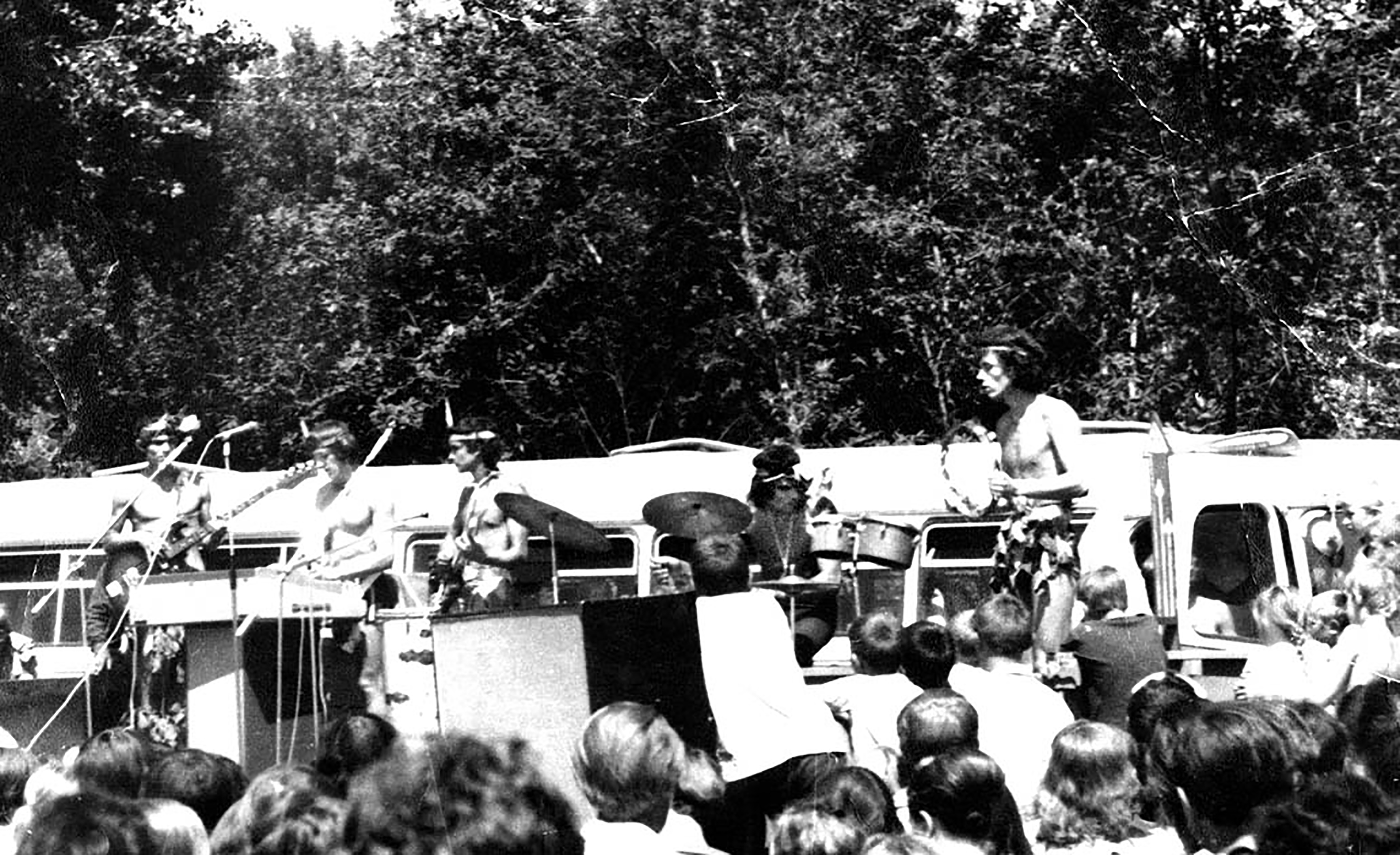 фотографии и афиши группы "Интеграл"